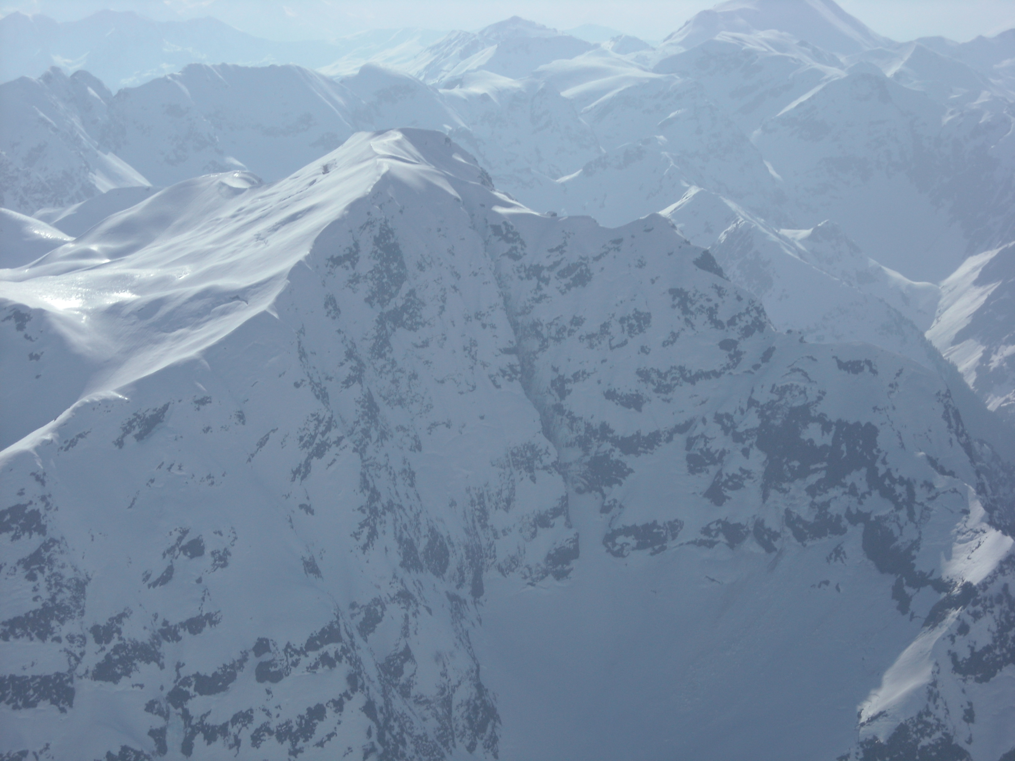 Vista del Tuc d'Ermèr